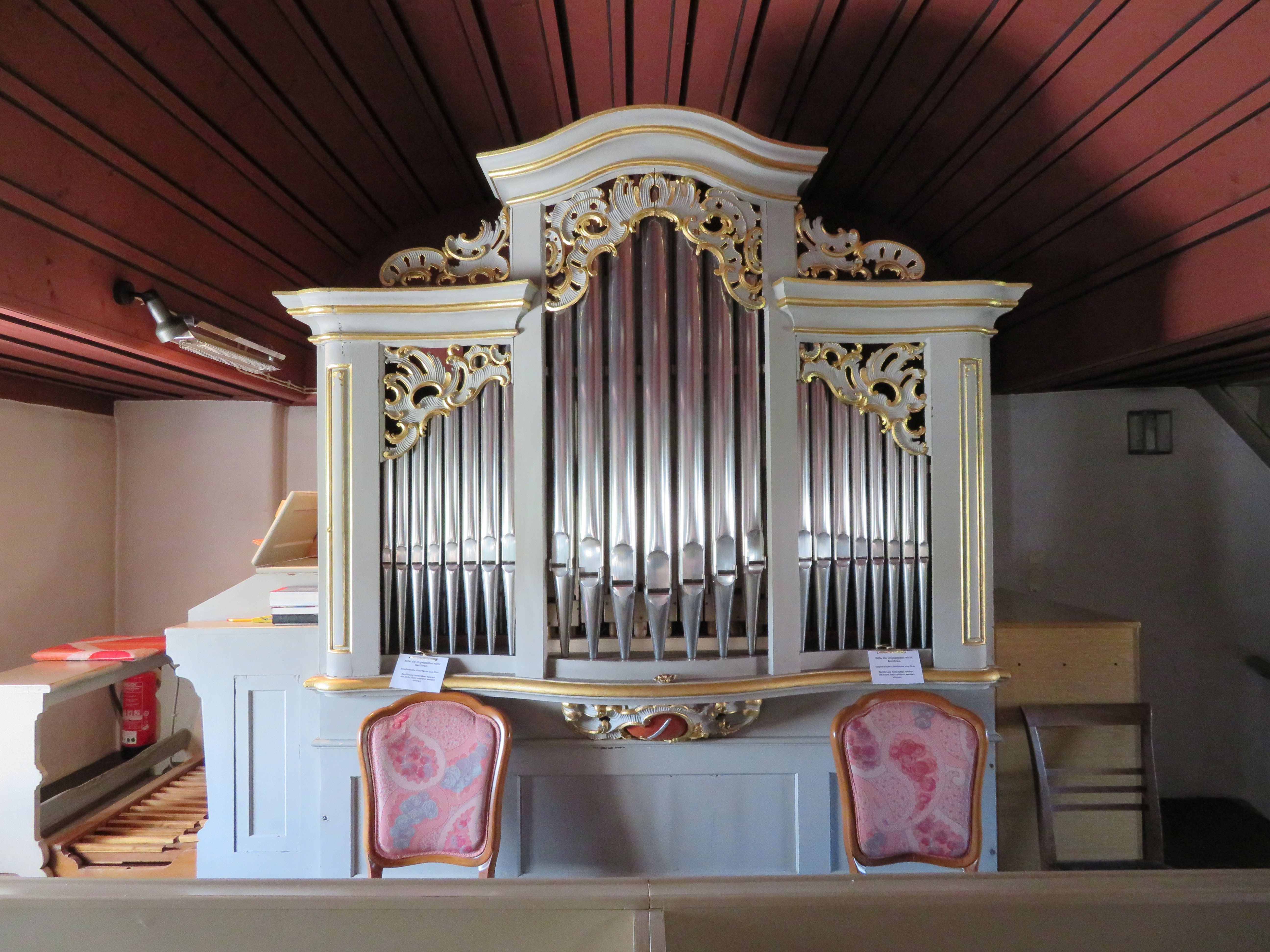 mit Orgelprospekt im Rokokostil